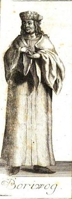 Bořivoj I.